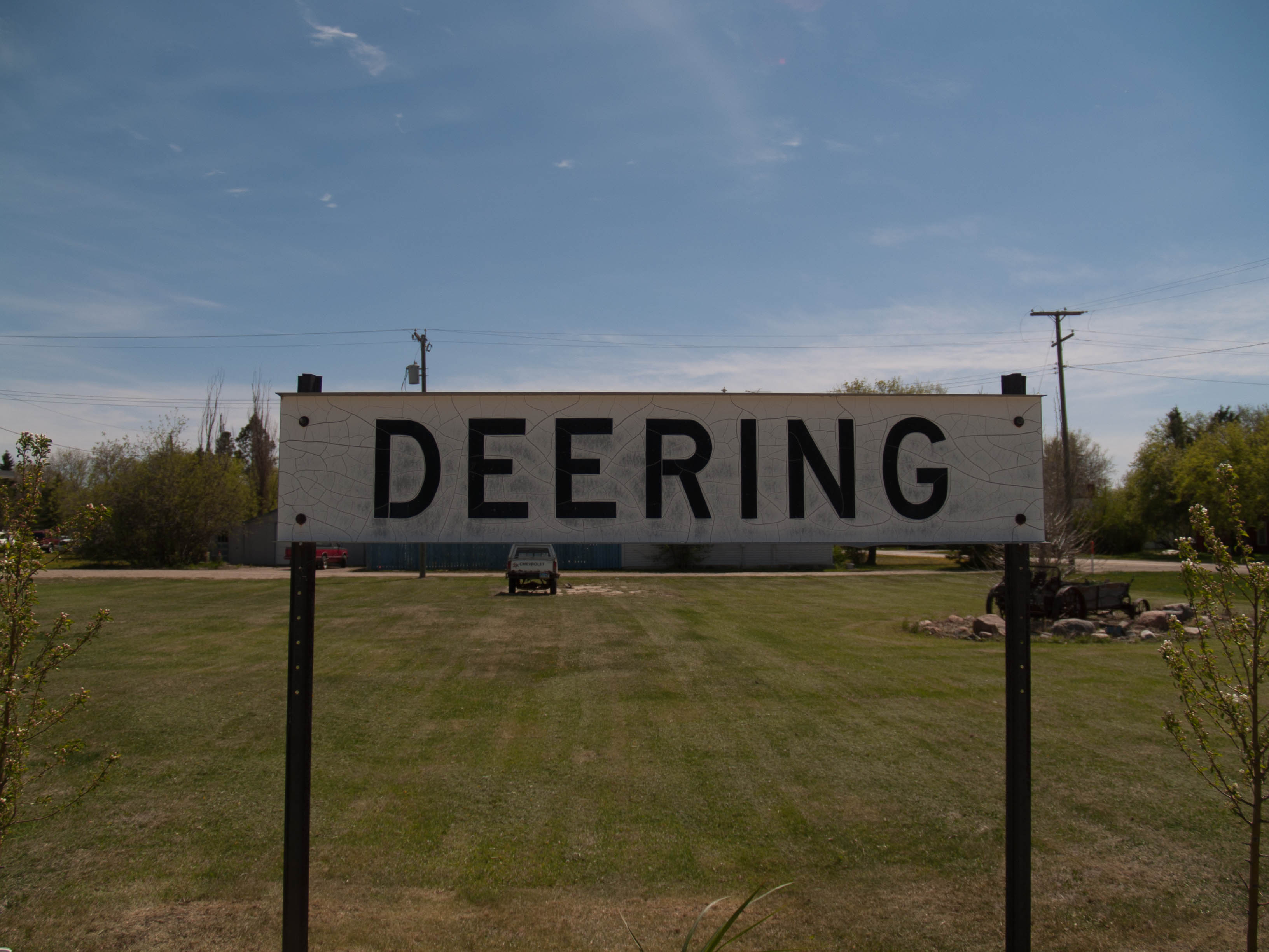 Deering sign in Deering, North Dakota